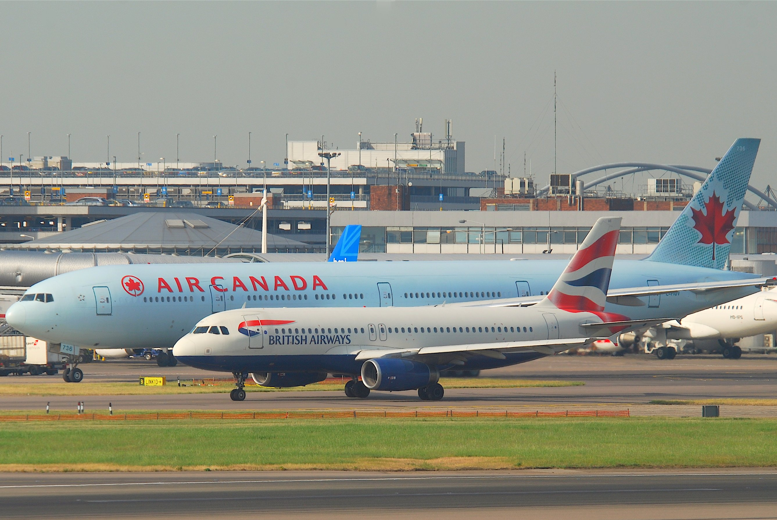 Triple 7 vs A320...